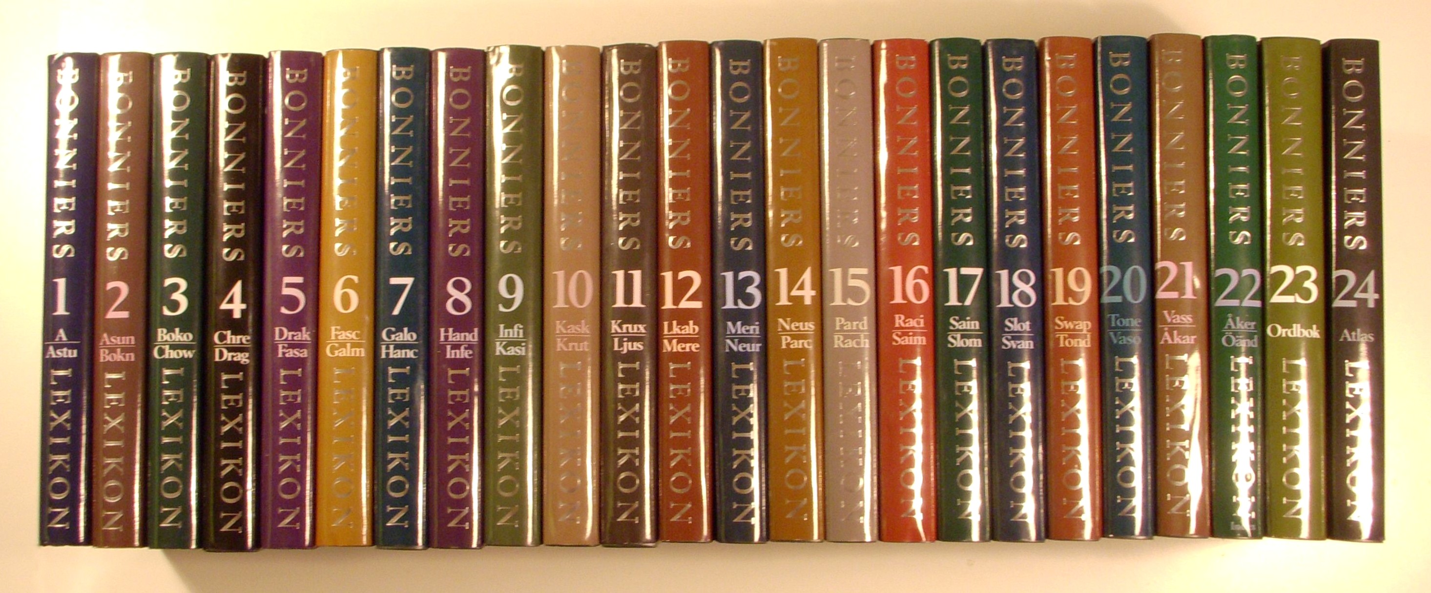 Bonniers Lexikon, 24 band från 1993-1998